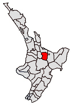 Die Karte zeigt die Lage des Rotorua District Council auf der Nordinsel Neuseelands rot